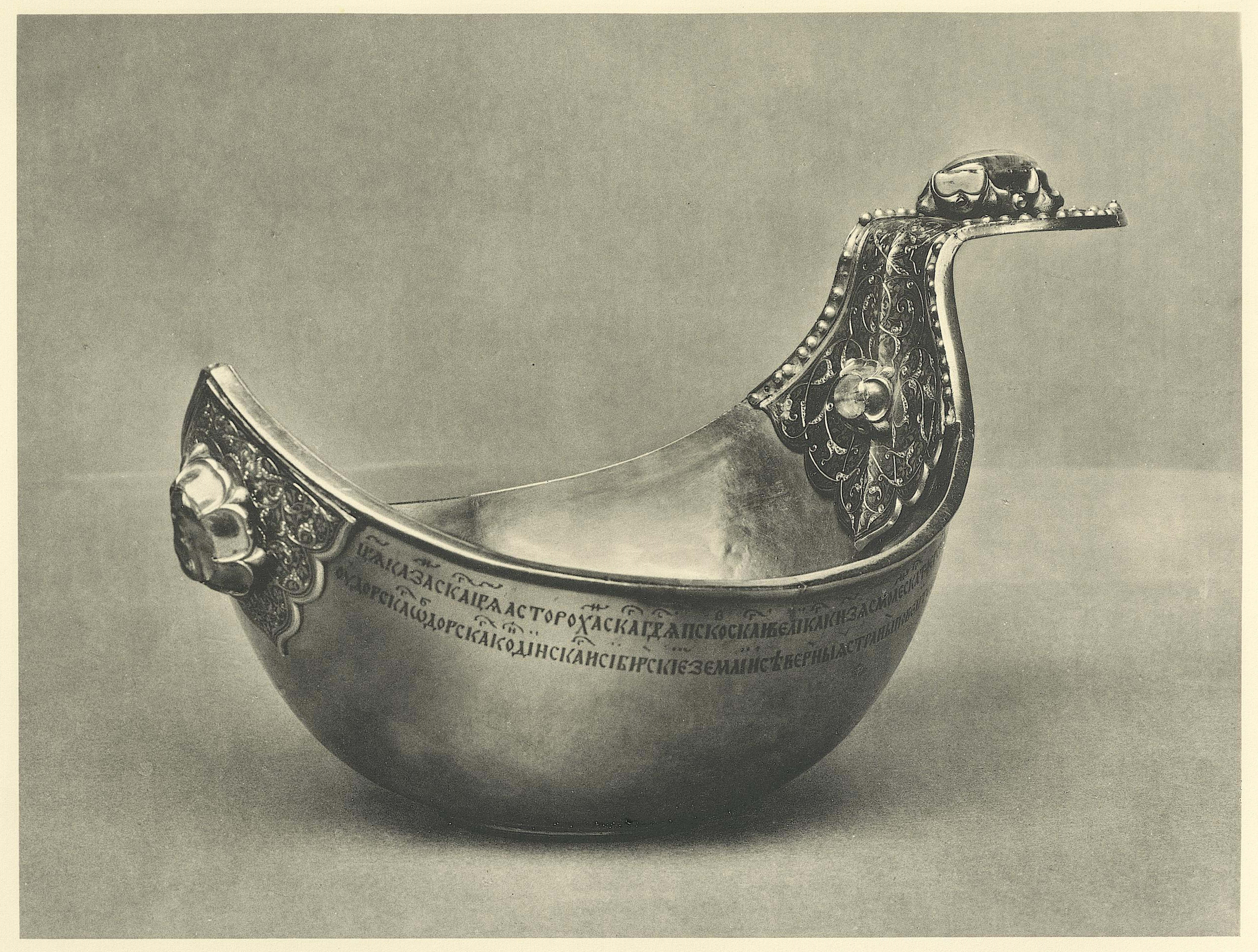 Trinkschale des Zaren Iwan des Schrecklichen (Beschreibung gemäß Quelle) aus: Das Grüne Gewölbe zu Dresden: eine Auswahl von Meisterwerken der Goldschmiedekunst ; in vier Bänden (Band 2): Gefässe, Figuren und Uhren: aus Gold und Silber verziert in reiner Metalltechnik, oder besetzt mit Juwelen, Kameen und Email ; mit 70 Lichtdrucktafeln, davon 7 farbig. Hiersemann, Leipzig